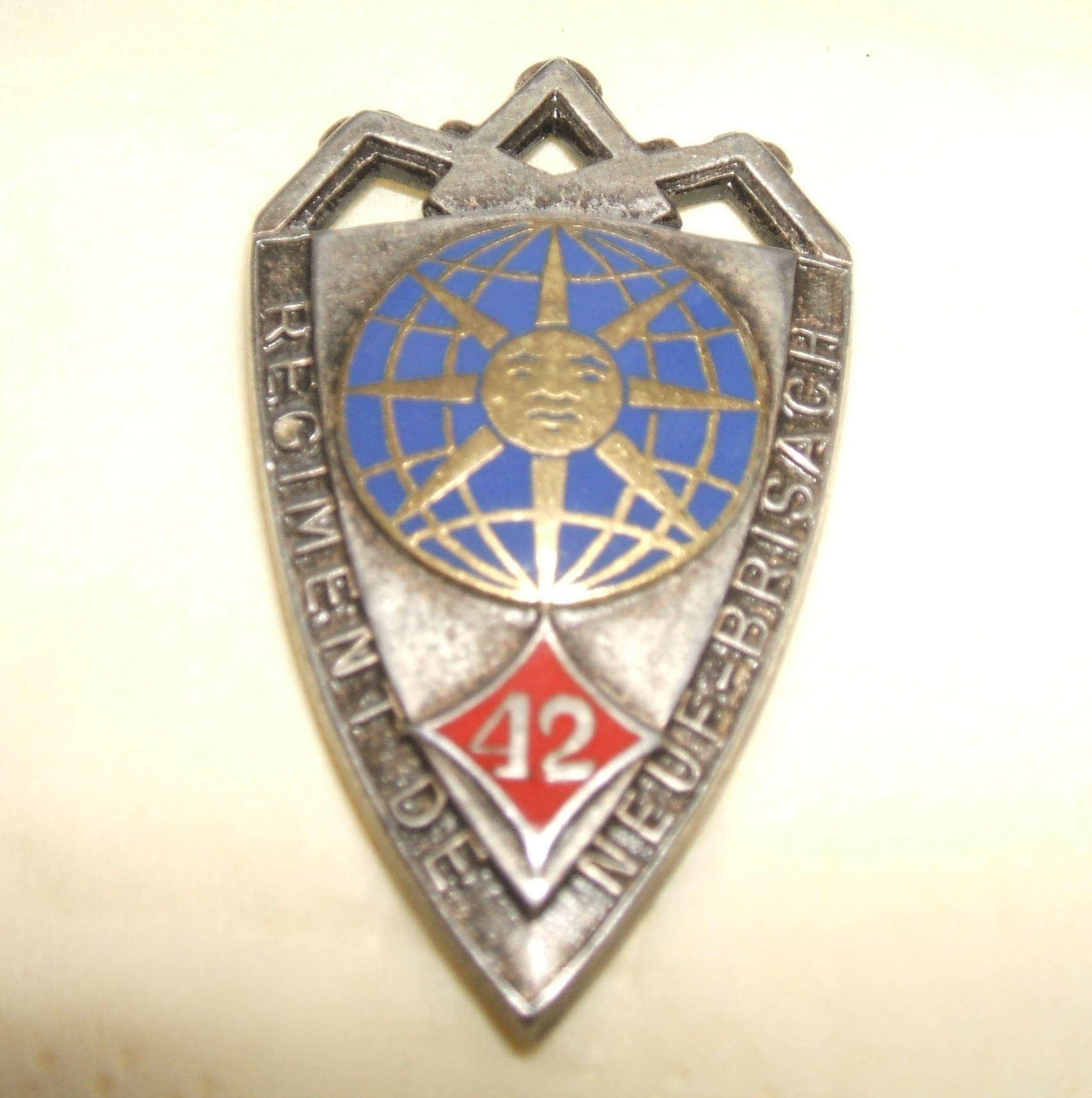 Insigne du 42ème Régiment d'infanterie de l'armée de terre française